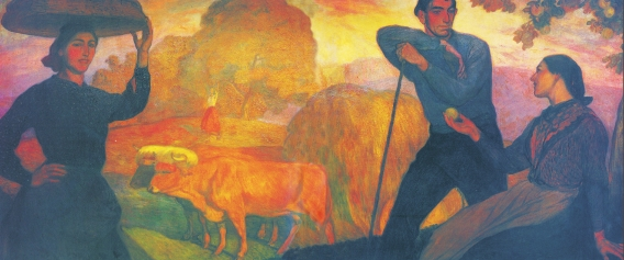 “Eva arratiarra”, 1913, Aurelio Arteta